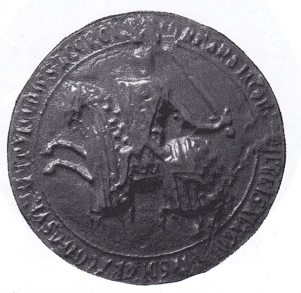 sello de cera roja de una sola impronta, de Jaime de Aragón, conde de Urgel y vizconde de Ager, de 1339. Representa a su titular cabalgando hacia la izquierda, blandiendo la espada y embarazando un escudo dimidiadao de Aragón y Urgel, emblema reiterado en las coberturas del caballo. A su alrededor, la leyenda [+] INFANS IACOB[VS D](omi)NI REGIS · ARAGO(num) · FIL(iu)S · D(e)I GRA(tia) · COMES V[RGE]L(li) ET VICE(c)OM(e)S AGERERI